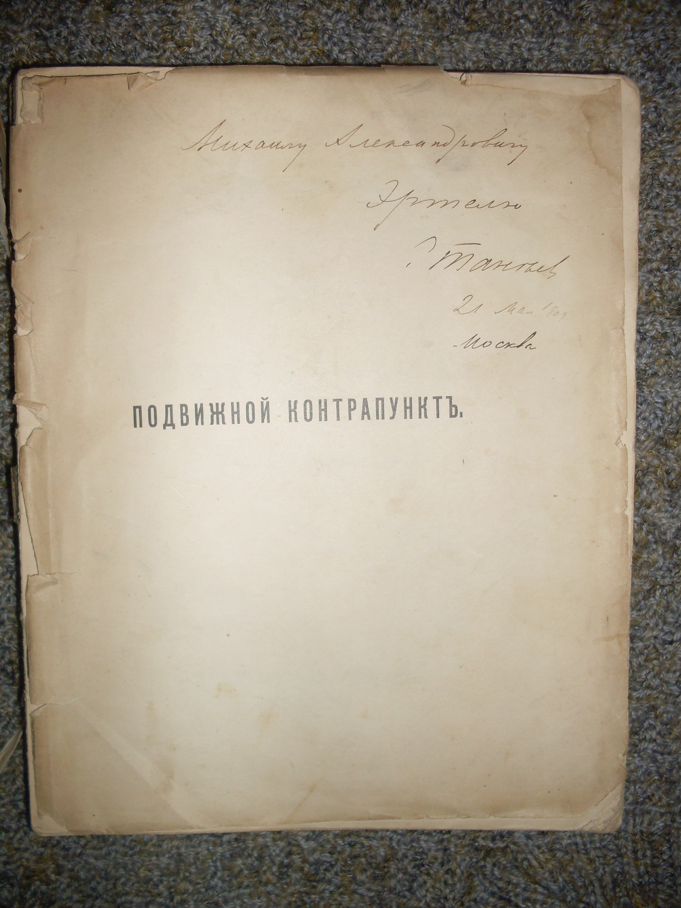 Книга композитора Сергея Танеева с авторской дарственной надписью М.А.Эртелю (1909 года).